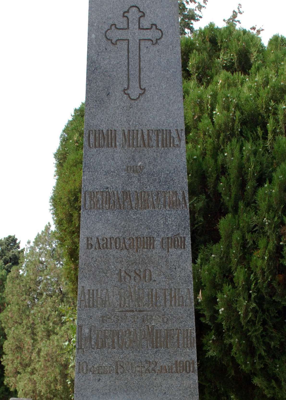 1826-1901, правник, политичар и први уредник ″Заставе″, вођа српског националног покрета у другој половини 19. века, народни посланик, оснивач Народне странке; утицао на развитак књижевности у младости, писао поезију; посланик Српског црквеног сабора, а такође и Угарског и Хрватског сабора.